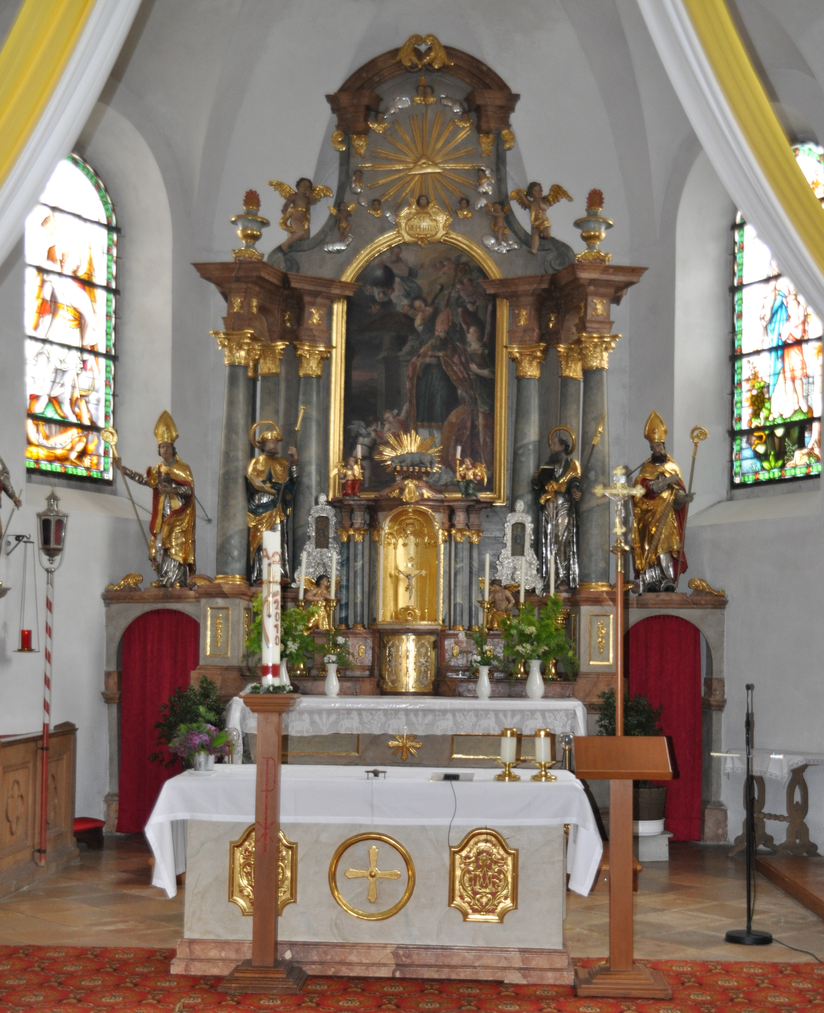 Brennberg (Bayern), Hauptaltar in der Pfarrkirche